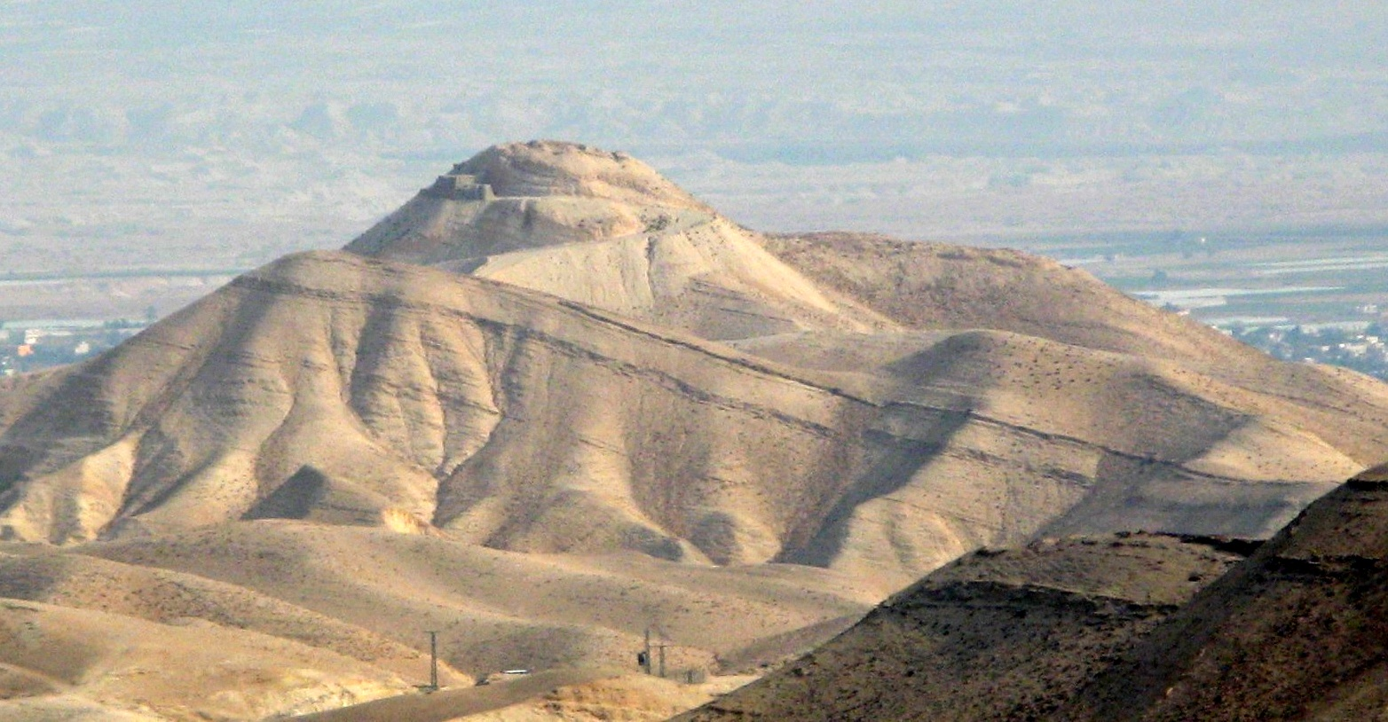 מבט לכיוון מזרח